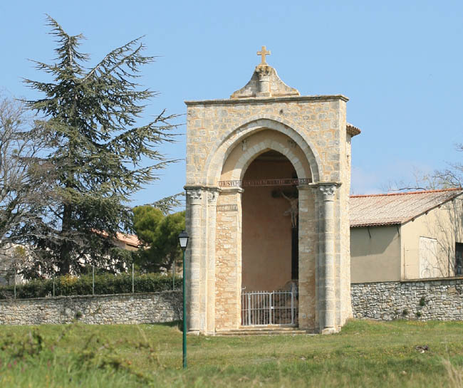 Village of Caseneuve, Vaucluse, France